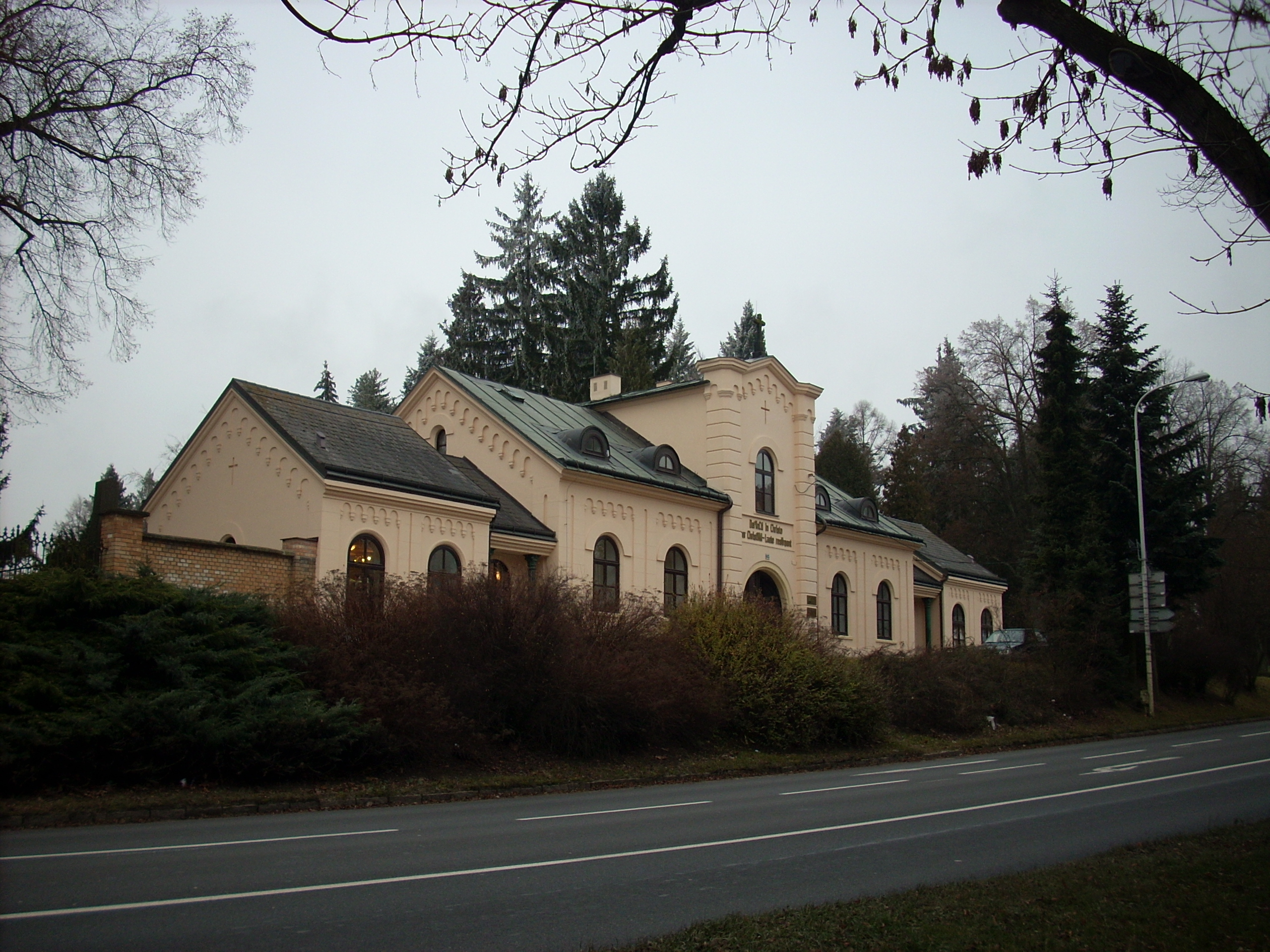 Jihlava, ústřední hřbitov - vstup